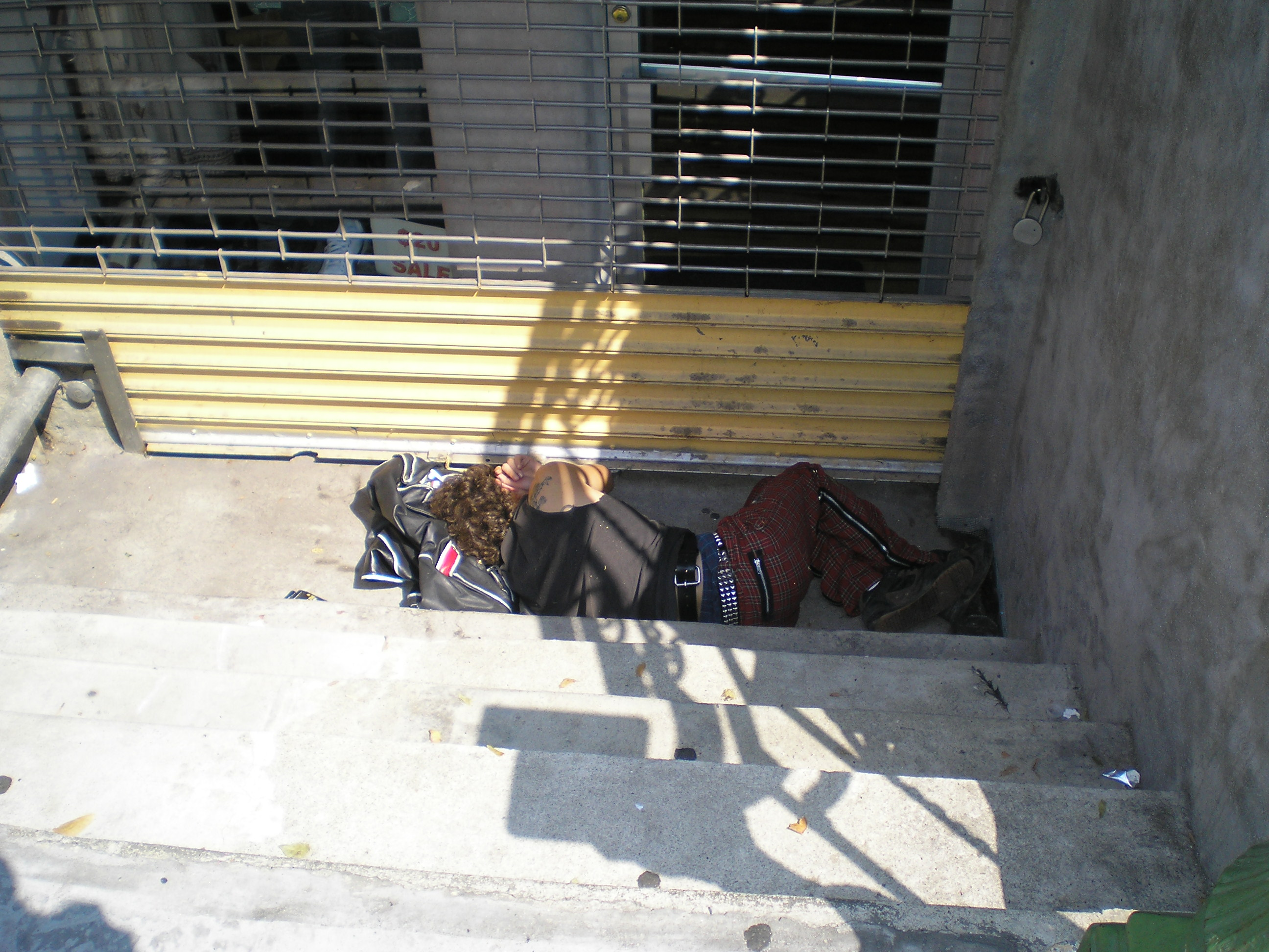 Street Sleeper 4 by David Shankbone